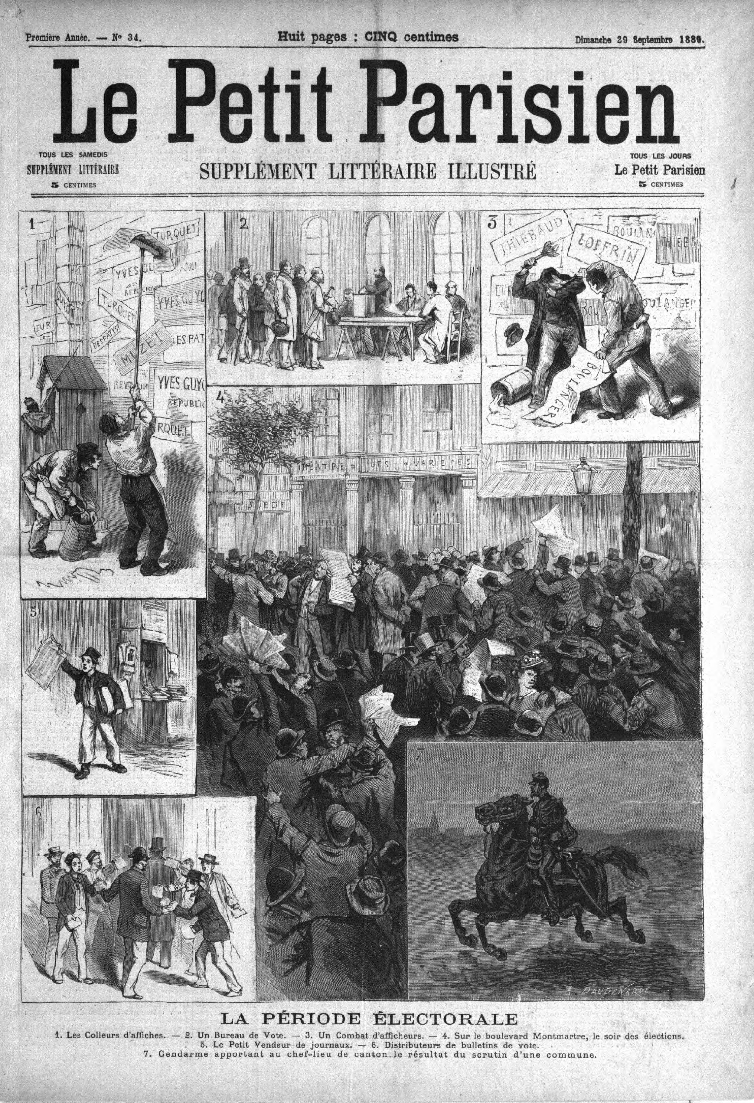 Titre : La Période électorale Les colleurs d'affiches Un bureau de vote Un combat d'afficheurs Sur le boulevard Montmartre, le soir des élections Le petit vendeur de journaux Distributeurs de bulletins de vote Gendarme apportant au chef-lieu de canton le résultat du scrutin d'une commune Signature : Daudenarol ? Le Petit Parisien : Supplément littéraire illustré du 29 septembre 1889.